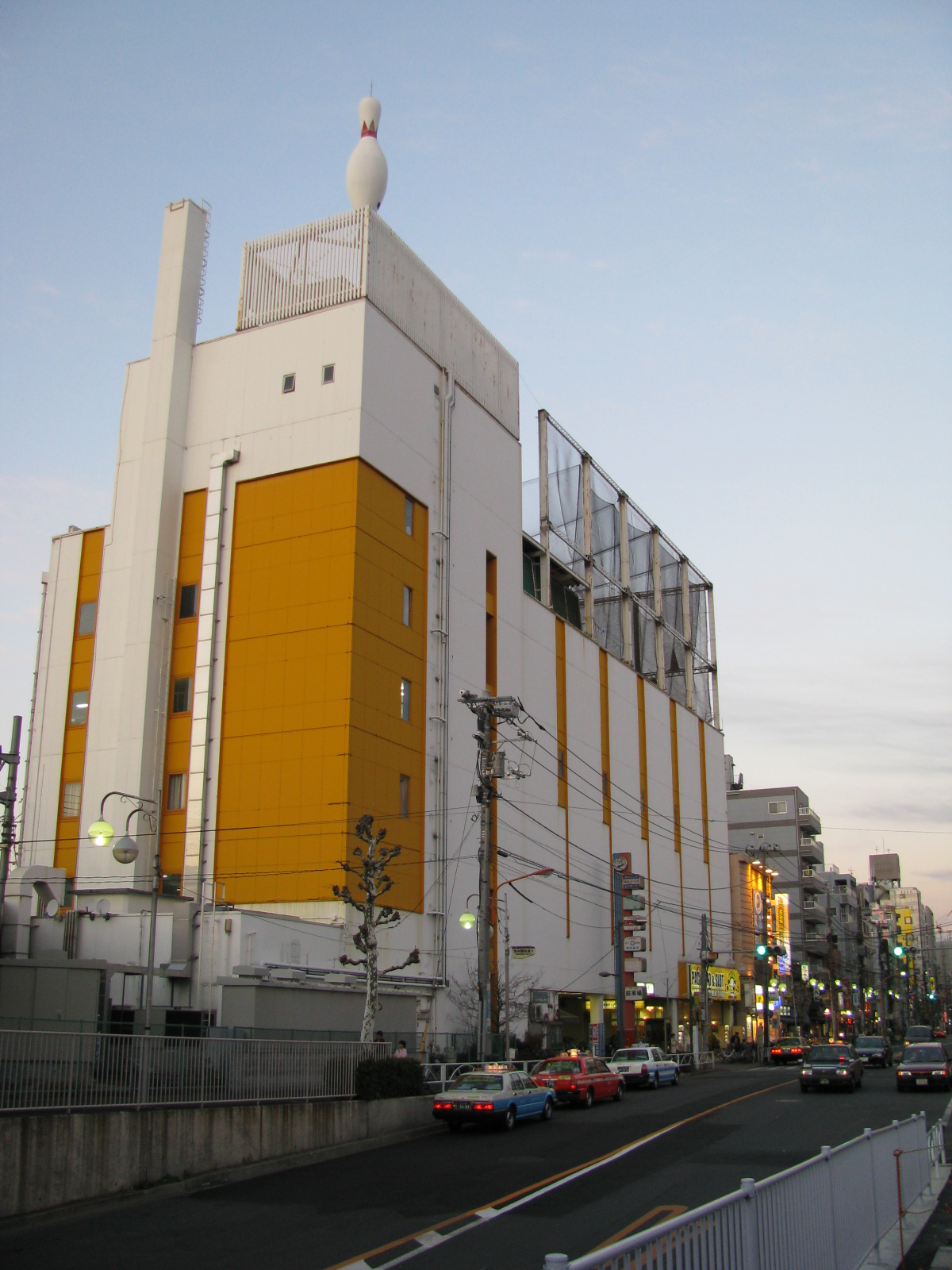 東武鉄道曳舟駅前のビル